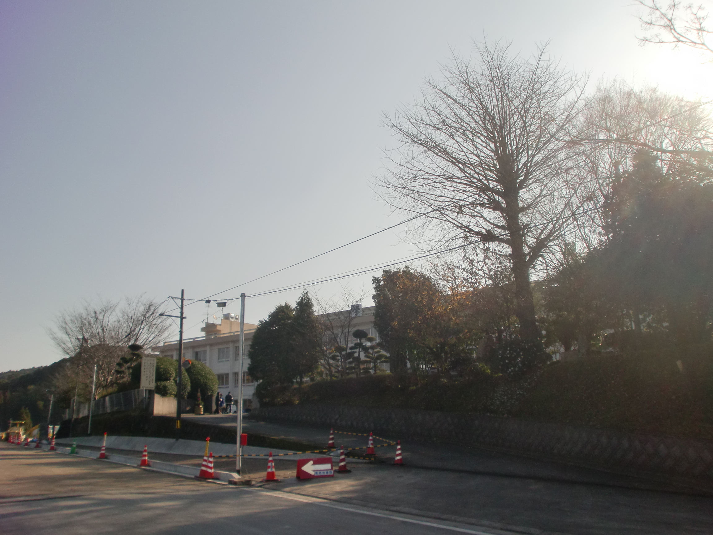 日置市立東市来中学校の外観。